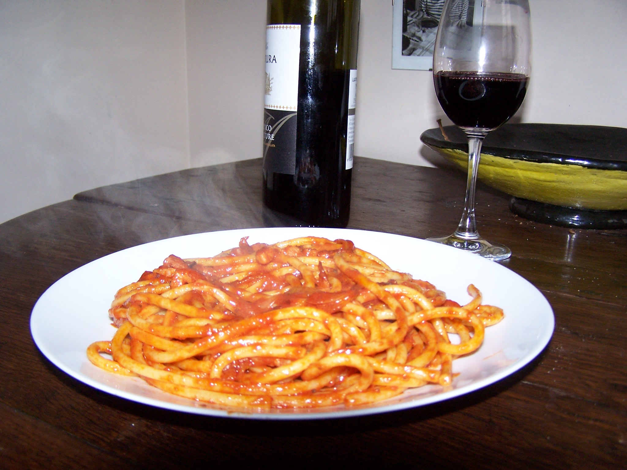 Classico bucatini all'amatriciana